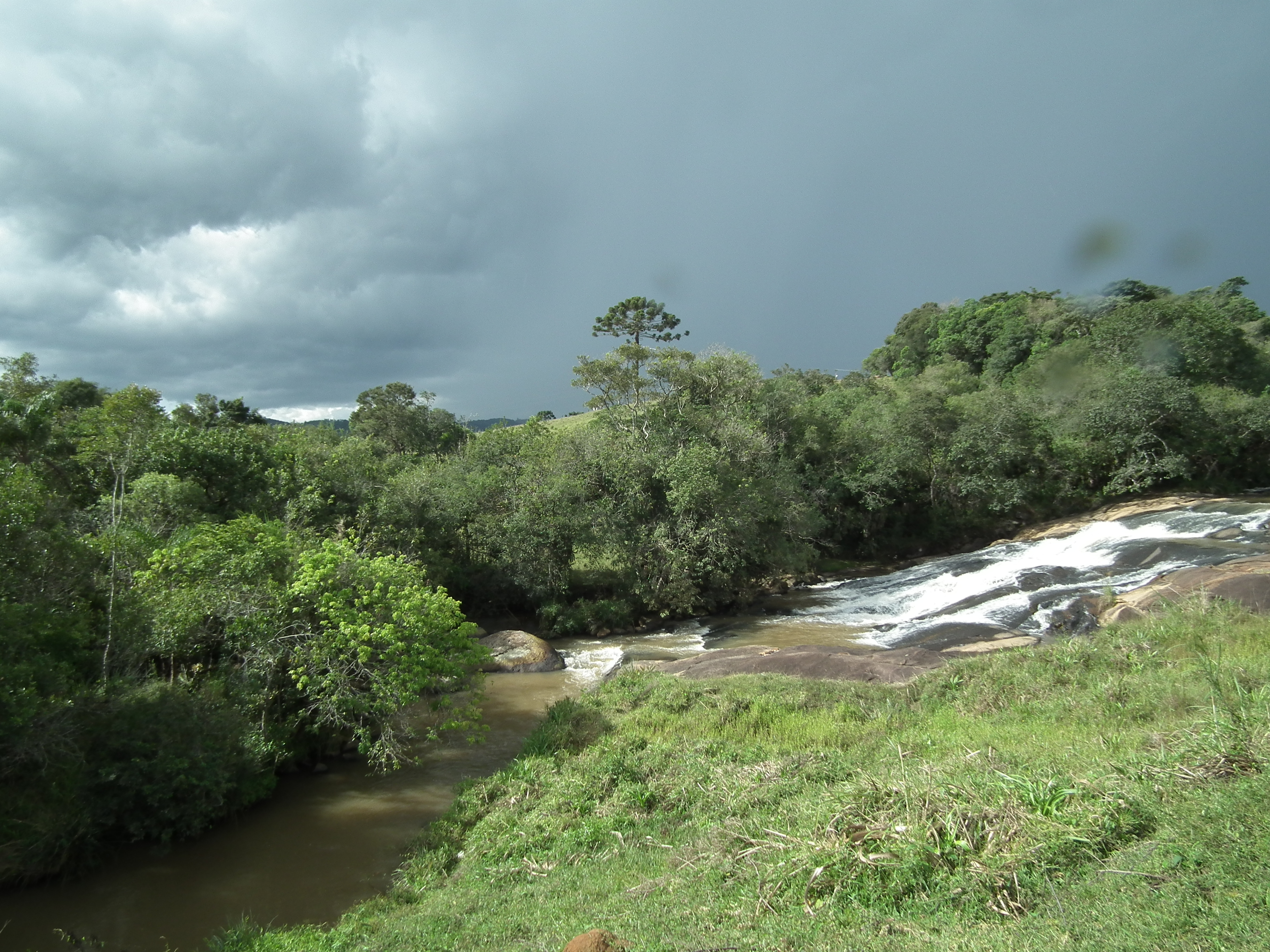 Cachoeira da Boca da mata é formado pelo Rio Camanducaia.